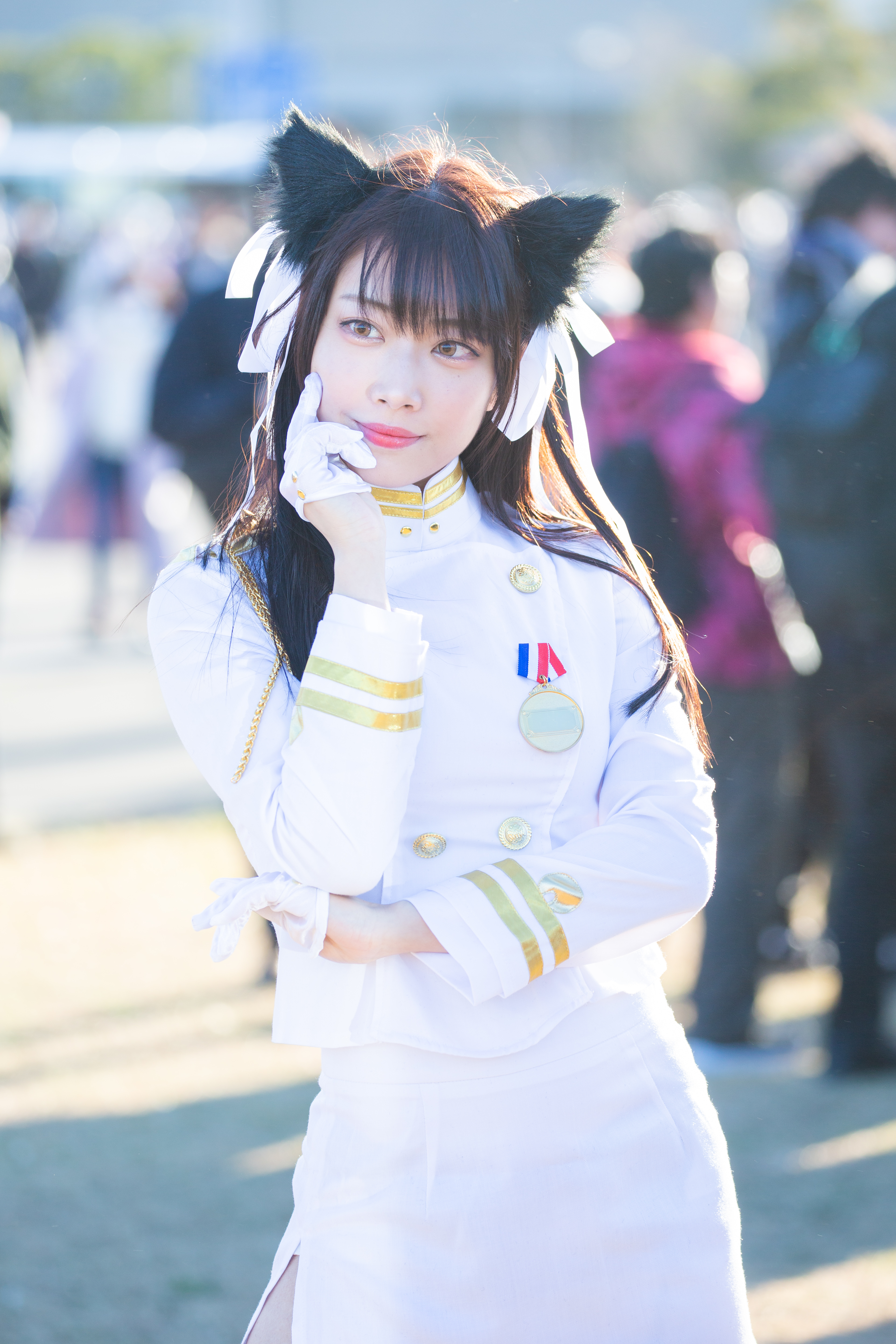 コミックマーケット95 2日目 コスプレイヤー